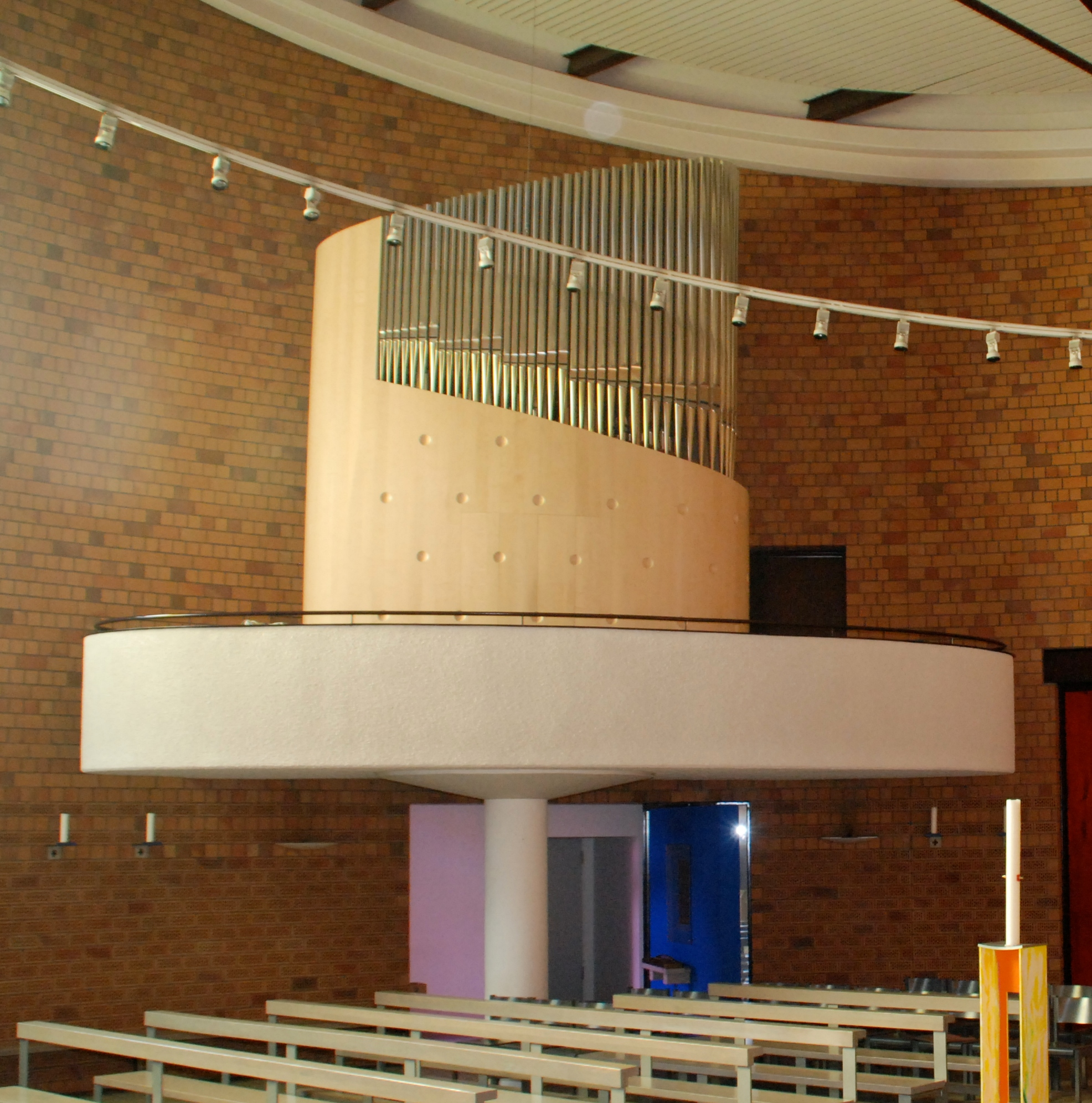 Hamburg-Neuallermöhe, kath. Edith-Stein-Kirche, Inneres, Orgel, Portale